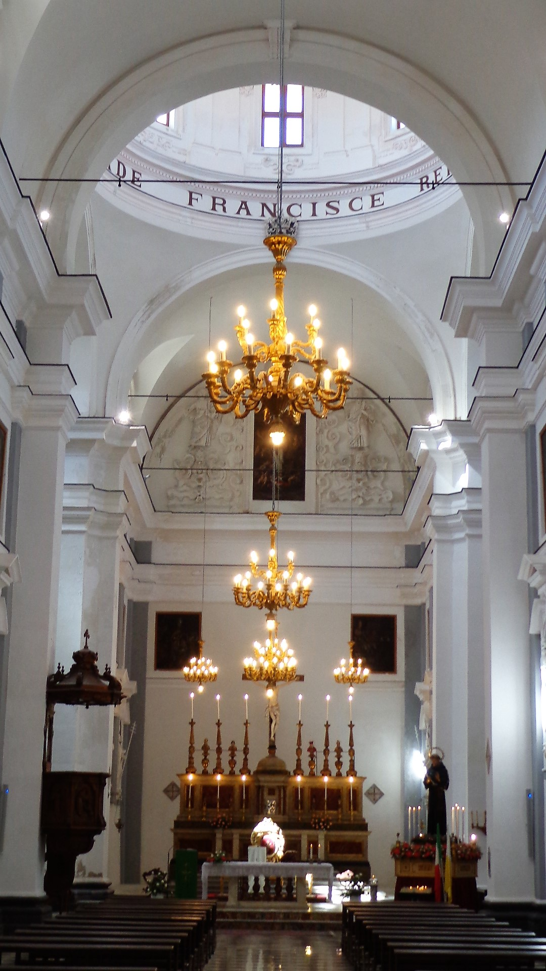 Scultura di Virtù Morale di Cristoforo Milanti